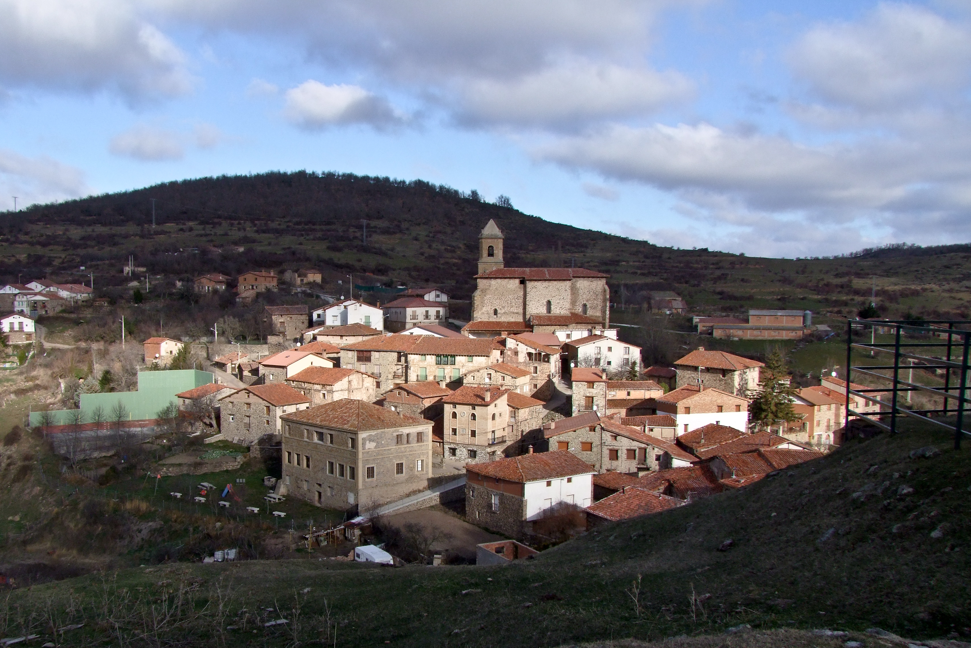 Muro en Cameros